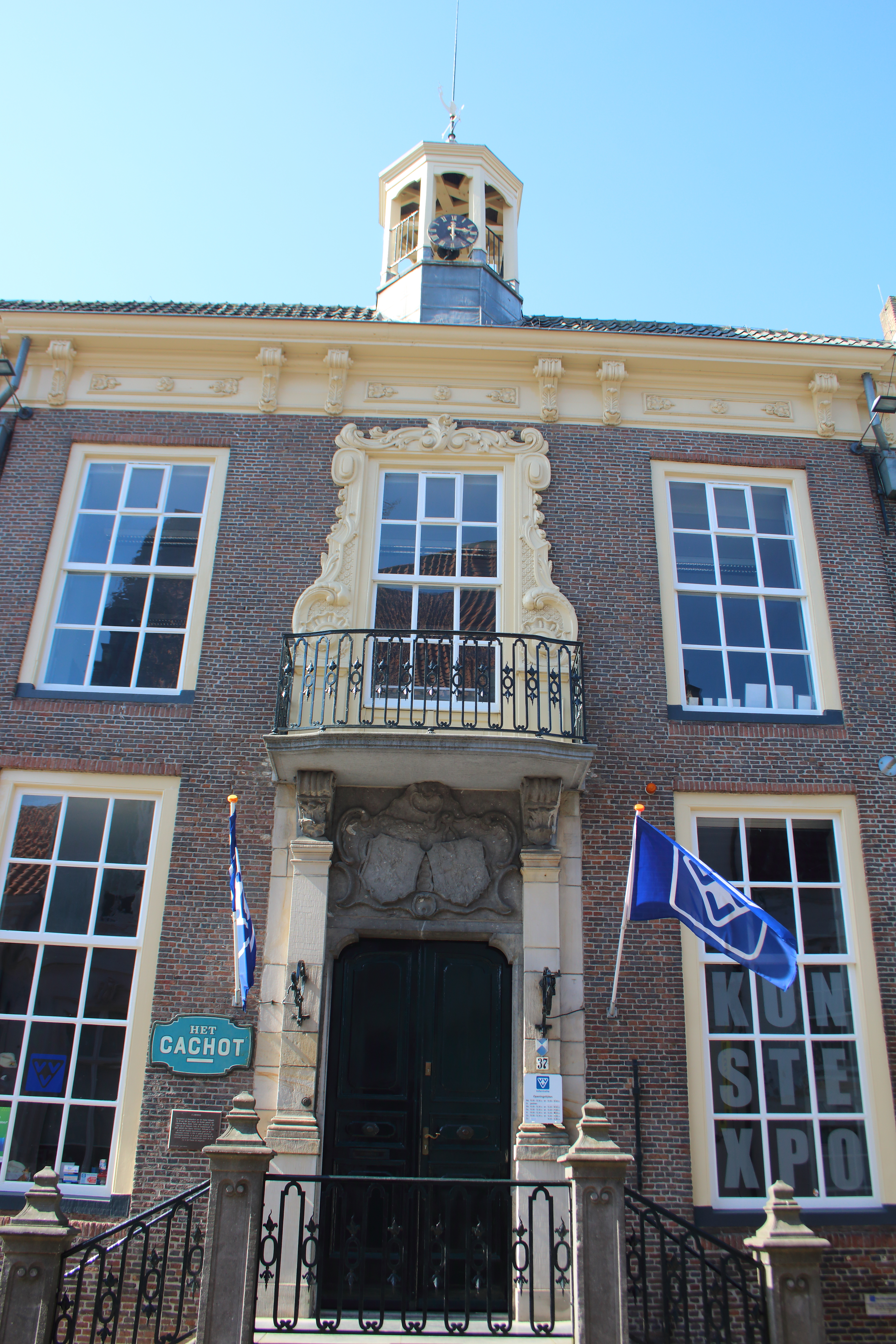 Landshuis, Hulst, Zeeuws-Vlaanderen, Zeeland, Nederland